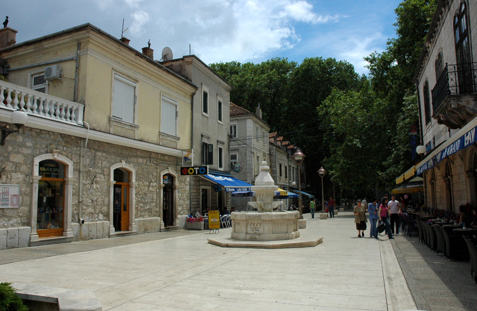 Trebinje street